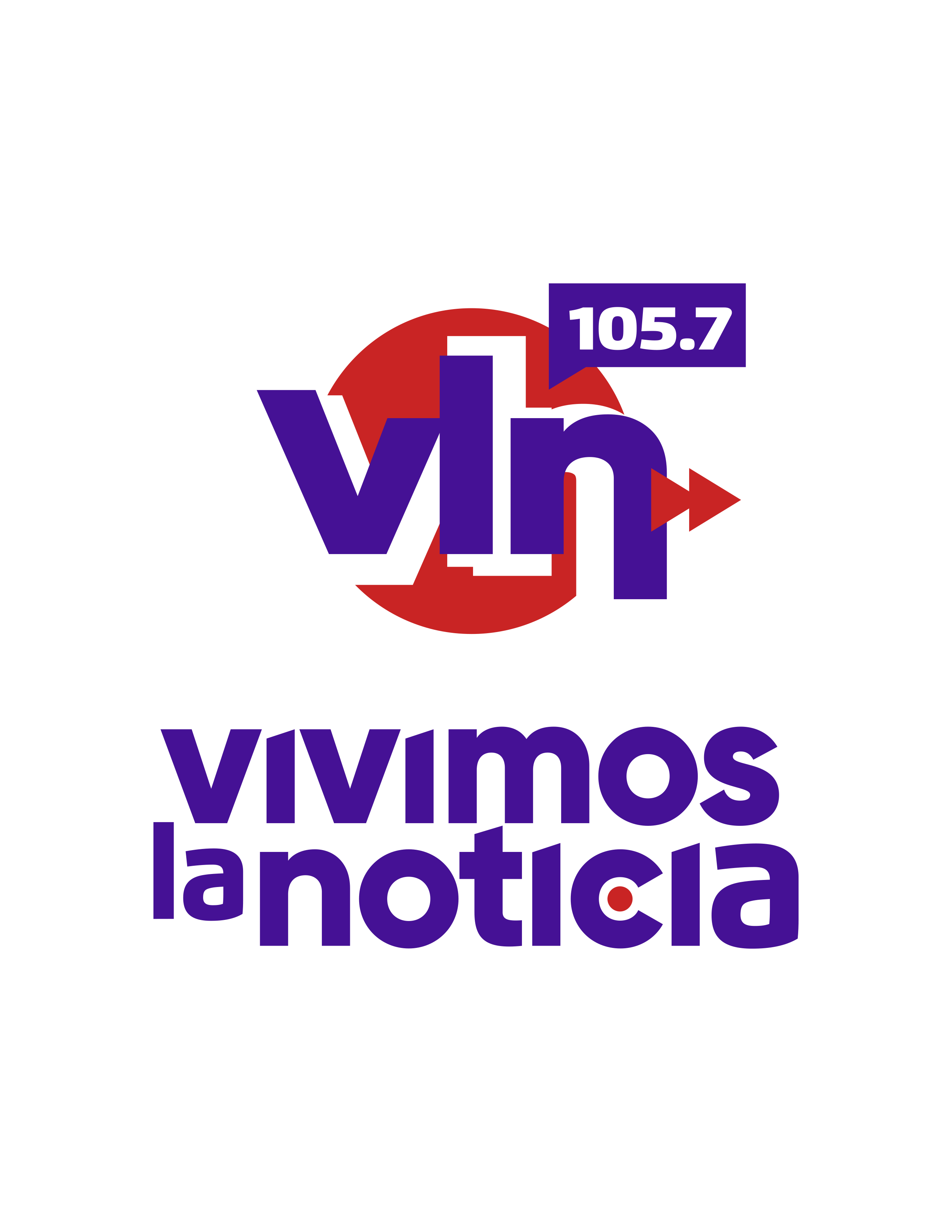 Logotipo Radioemisora curicana VLN Radio 105.7 FM